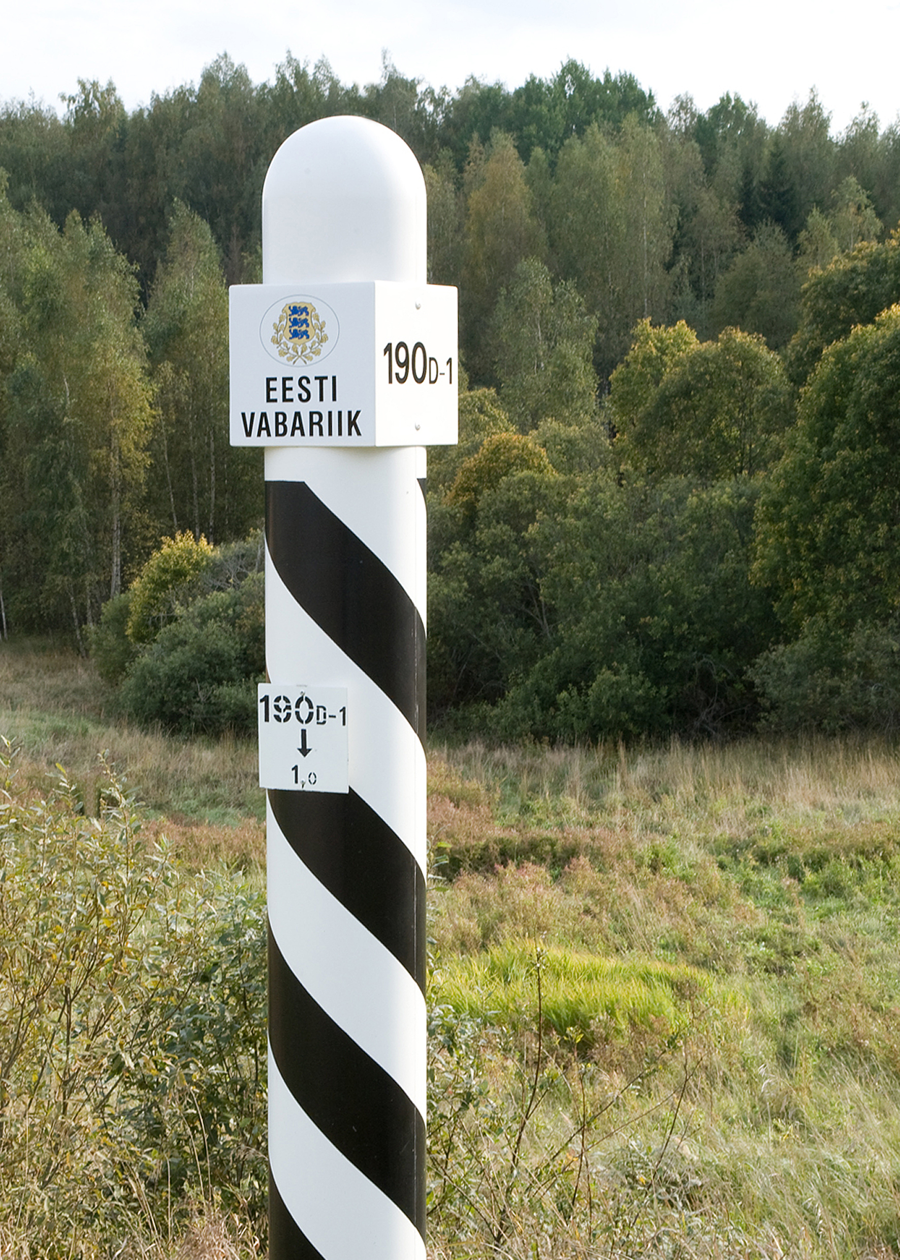 Piirimärk lõunapiiril.